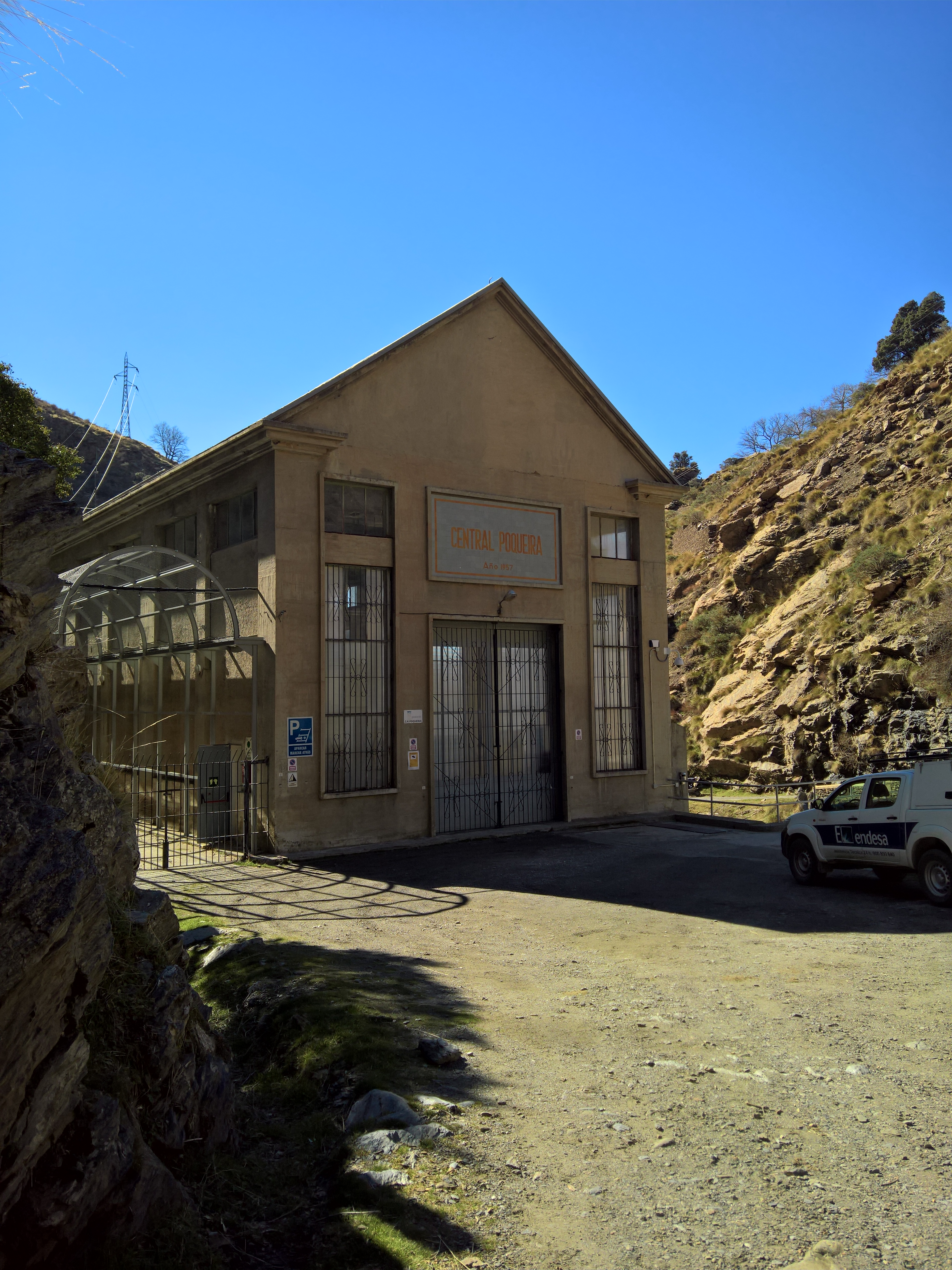 Central hidroeléctrica de Poqueira, en Capileira